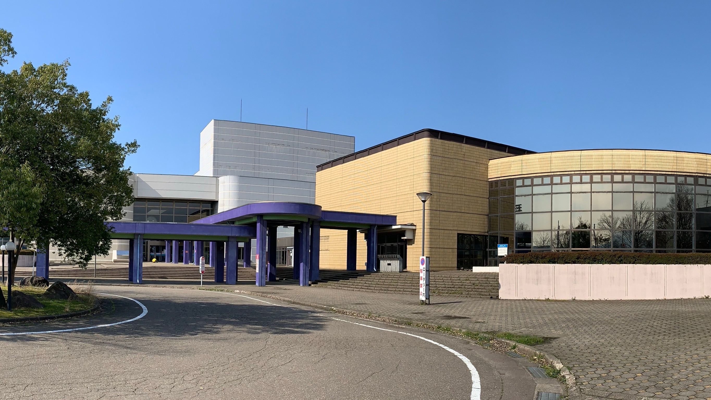 リージョンプラザ上越・上越科学館（2020年4月）